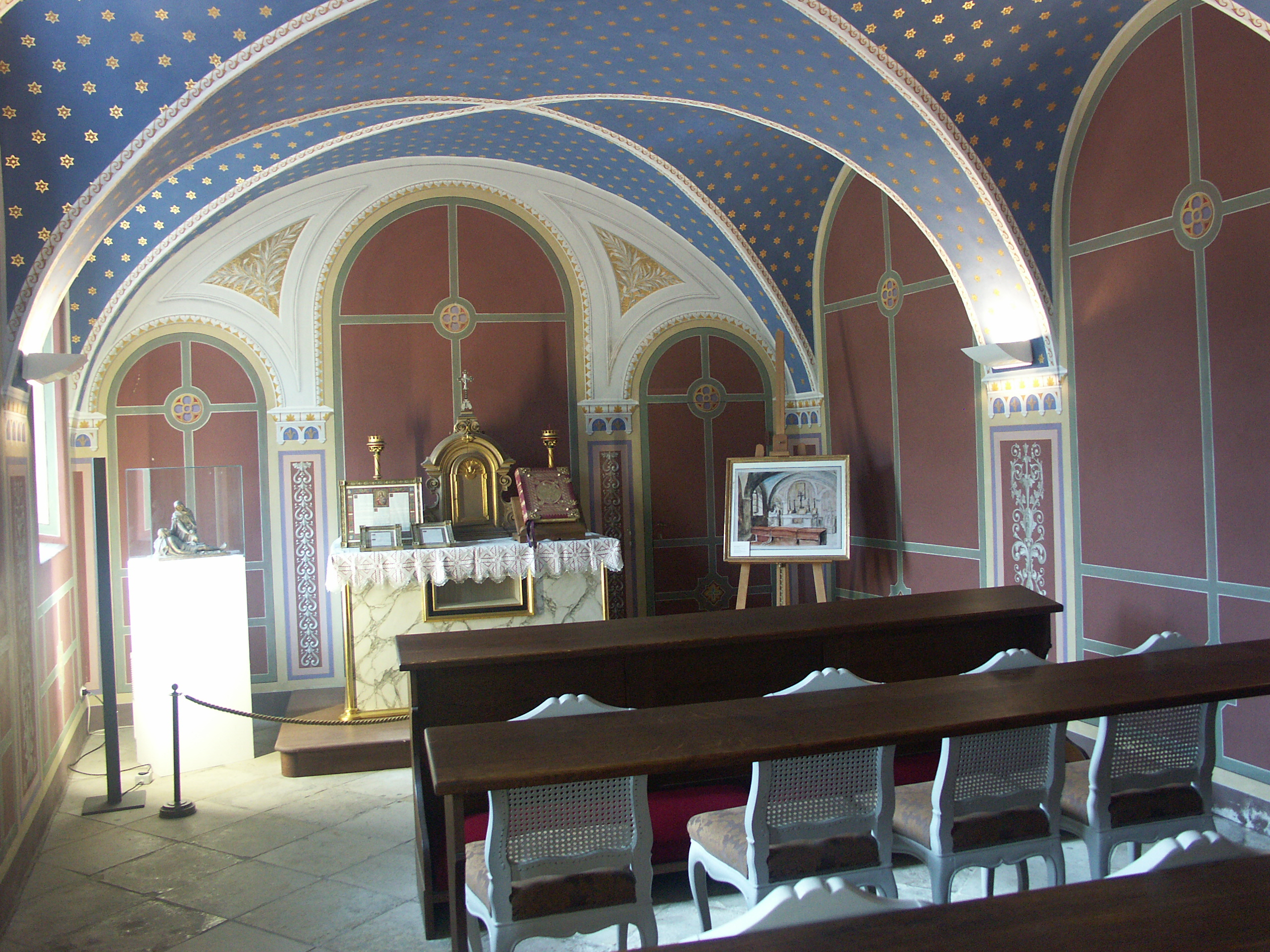 Katholische Kapelle auf Schloss Weesenstein